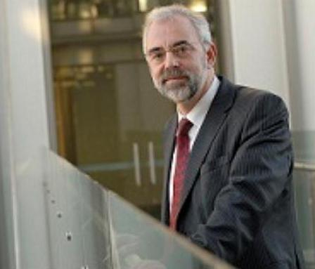 Foto von Paul van Son, CEO der Dii GmbH